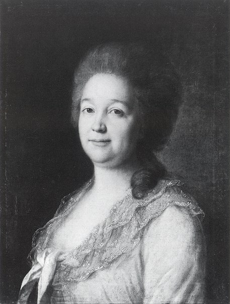 Волкова Екатерина Даниловна, урождённая Канищева (1746–1816), жена Александра Андреевича Волкова (1736– 1788).